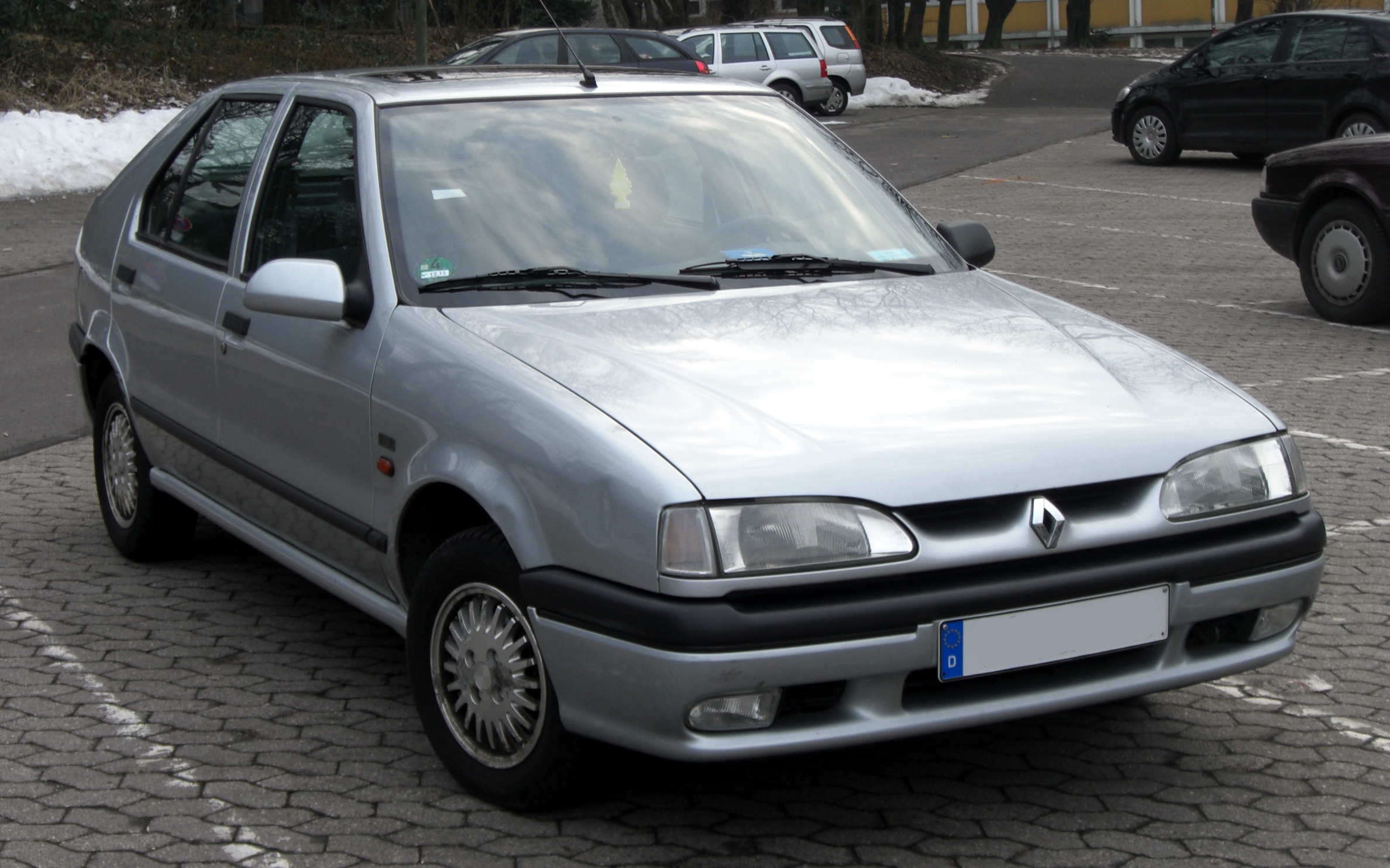 Renault 19 1.8 Limited